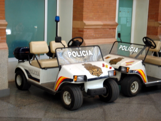 Vehículos de policía de la estación de Atocha.